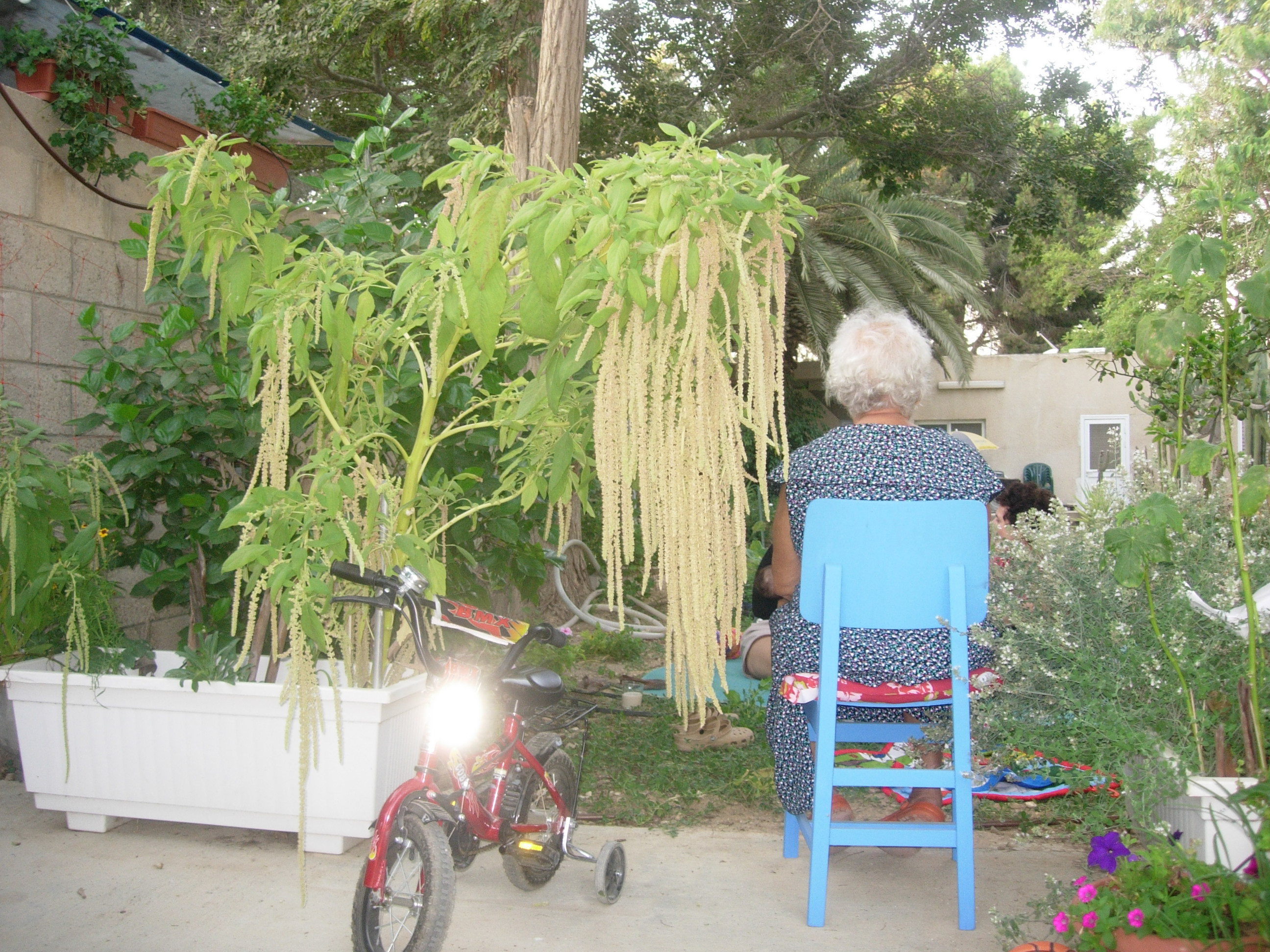 הירבוז צולם באחת הגינות של קיבוץ שדה בוקר